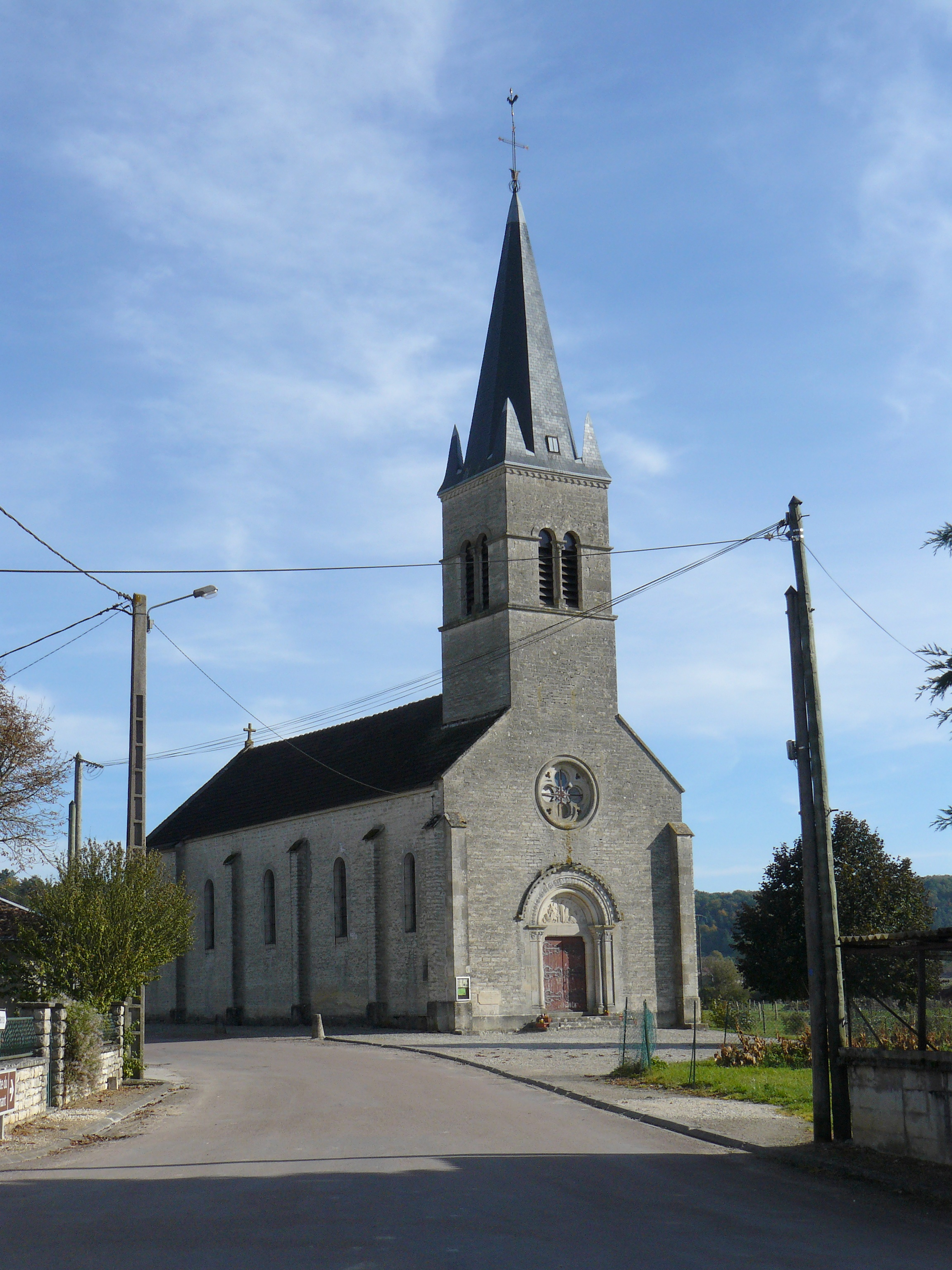 L'église du village d'Obtrée (Côte-d'Or, France).